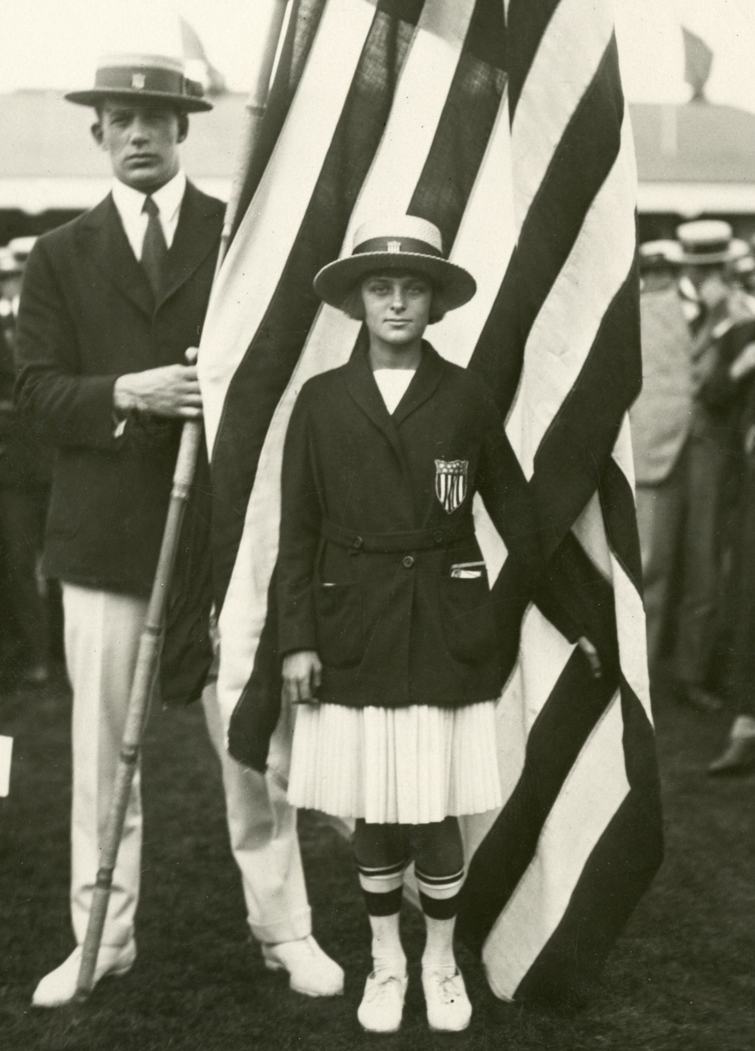 Olympische Spelen Antwerpen 1920. De jongste deelnemer (uit de VS) vóór de Amerikaanse vlag.